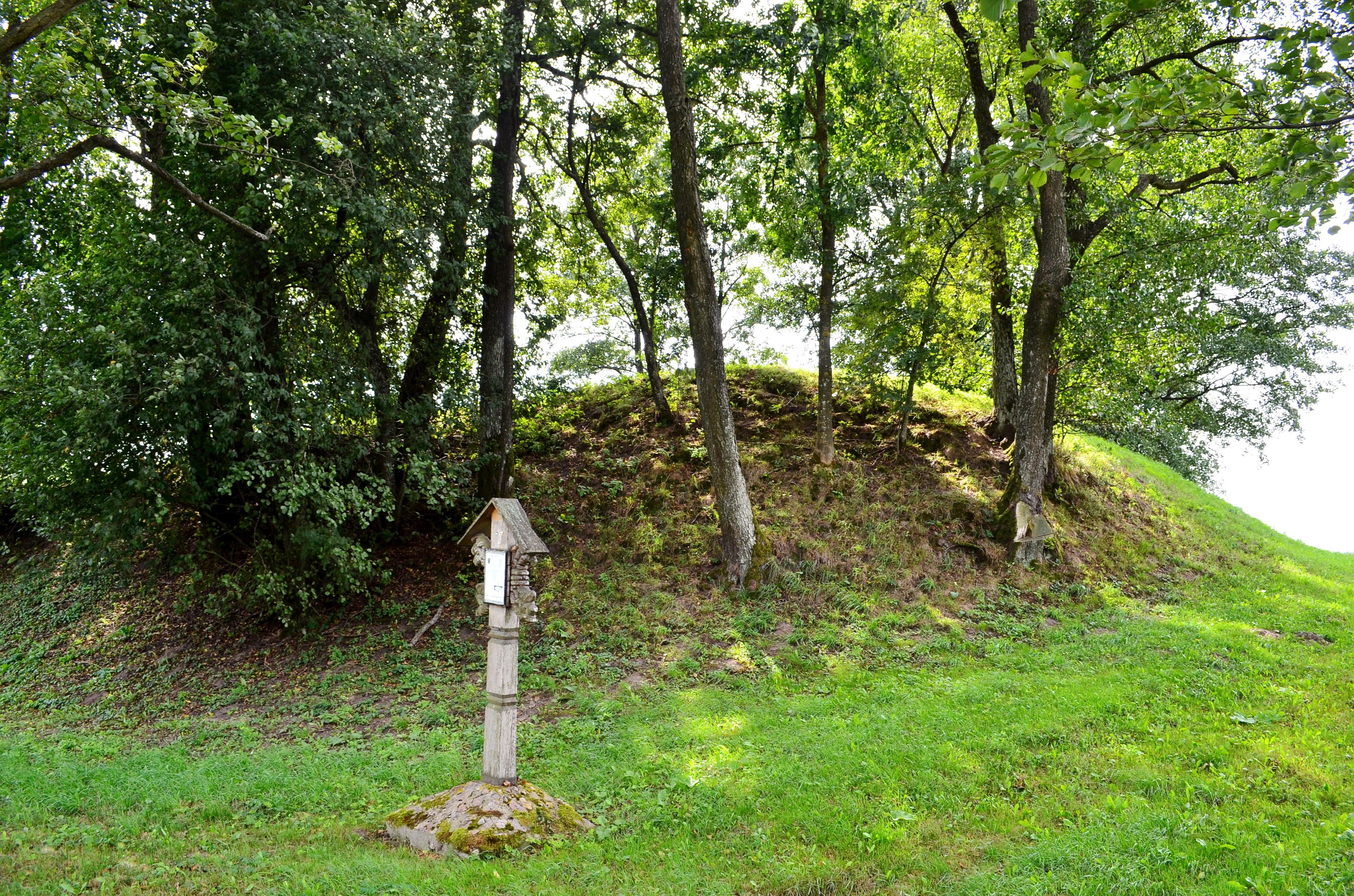 Piliūnų piliakalnis, Vilkaviškio raj.